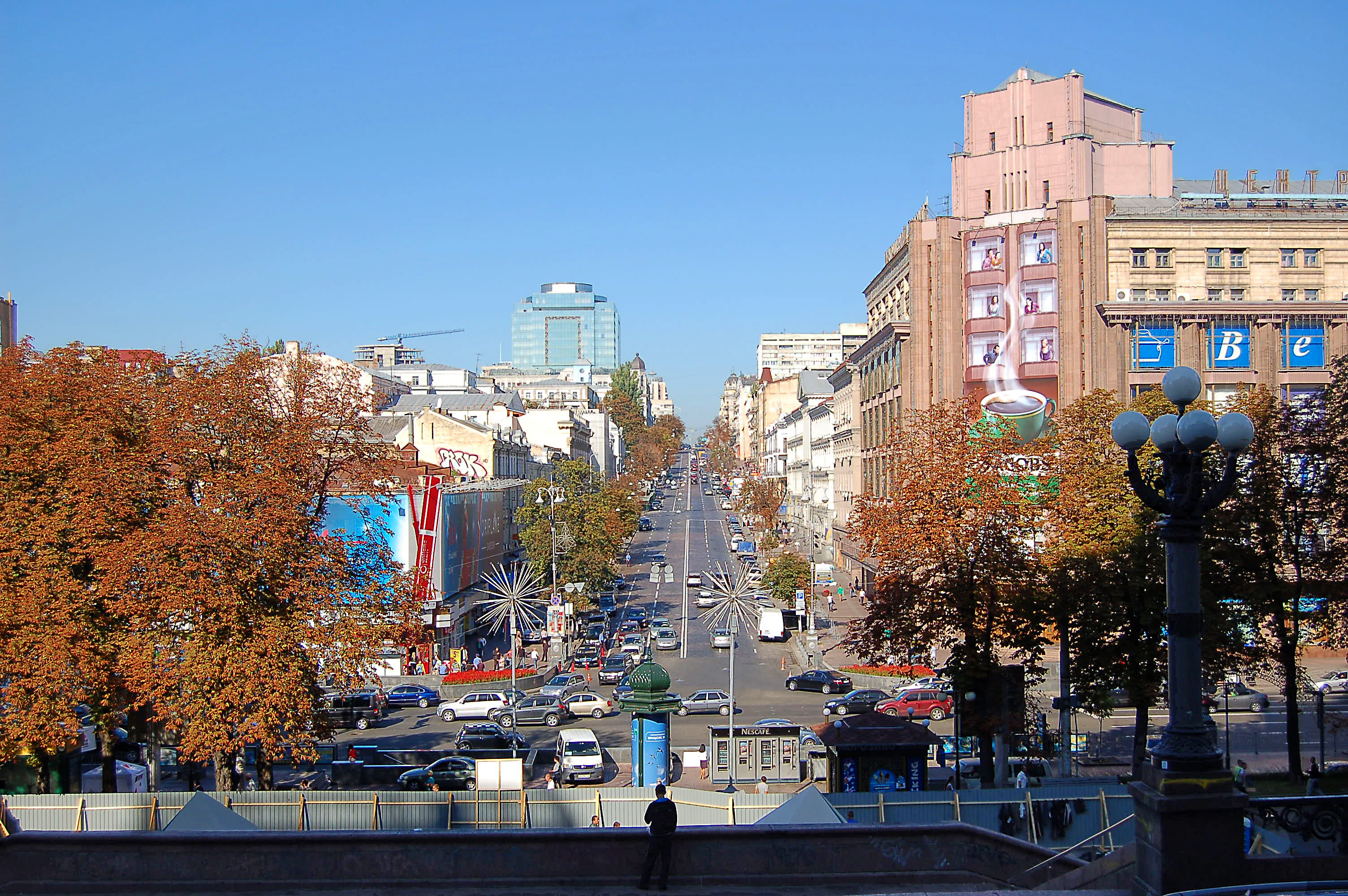 Вулиця_Богдана_Хмельницького_Київ_2011_01.JPG: Вулиця Богдана Хмельницького у Києві